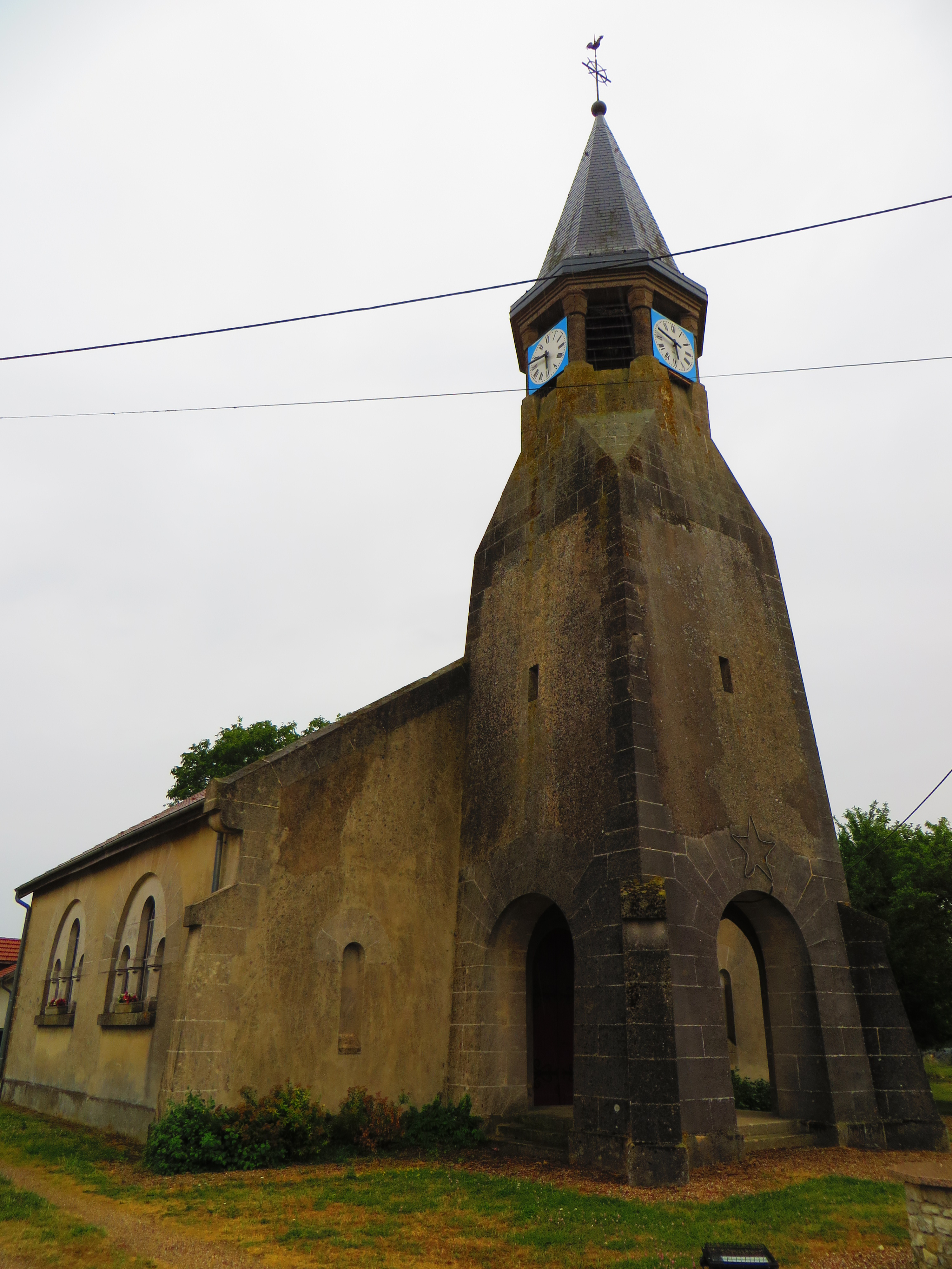 Maucourt-sur-Orne L'église Saint-Rémi